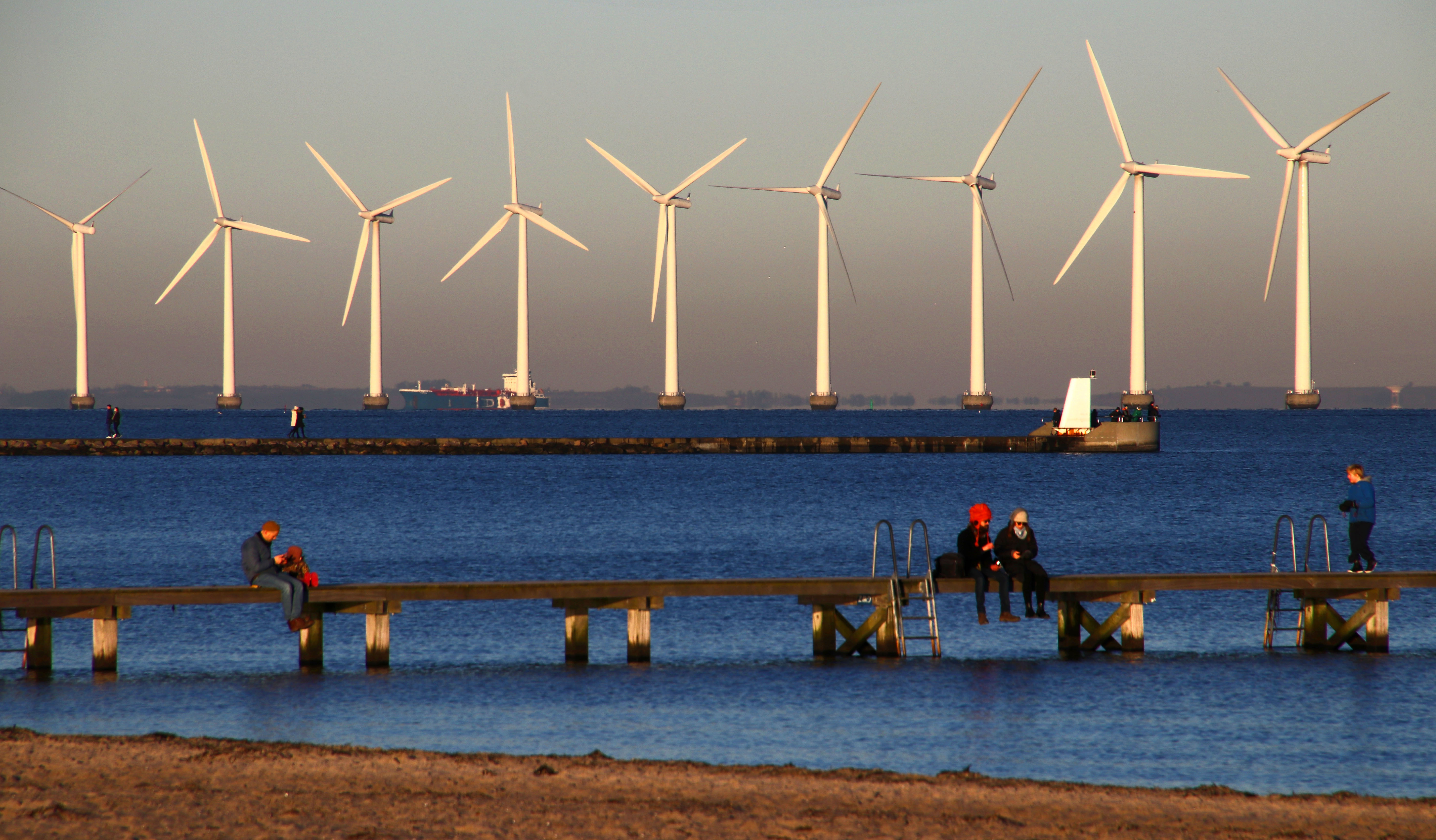 København / Copenhagen. På Amager Strandpark.